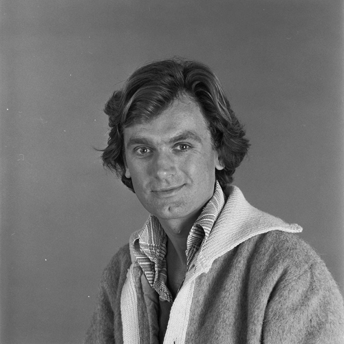 Carol van Herwijnen in 1976 op een foto van gemaakt door de persdienst van de NOS